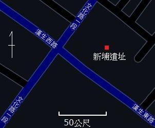 中文（台灣）: 台北縣板橋市新埔遺址地圖。